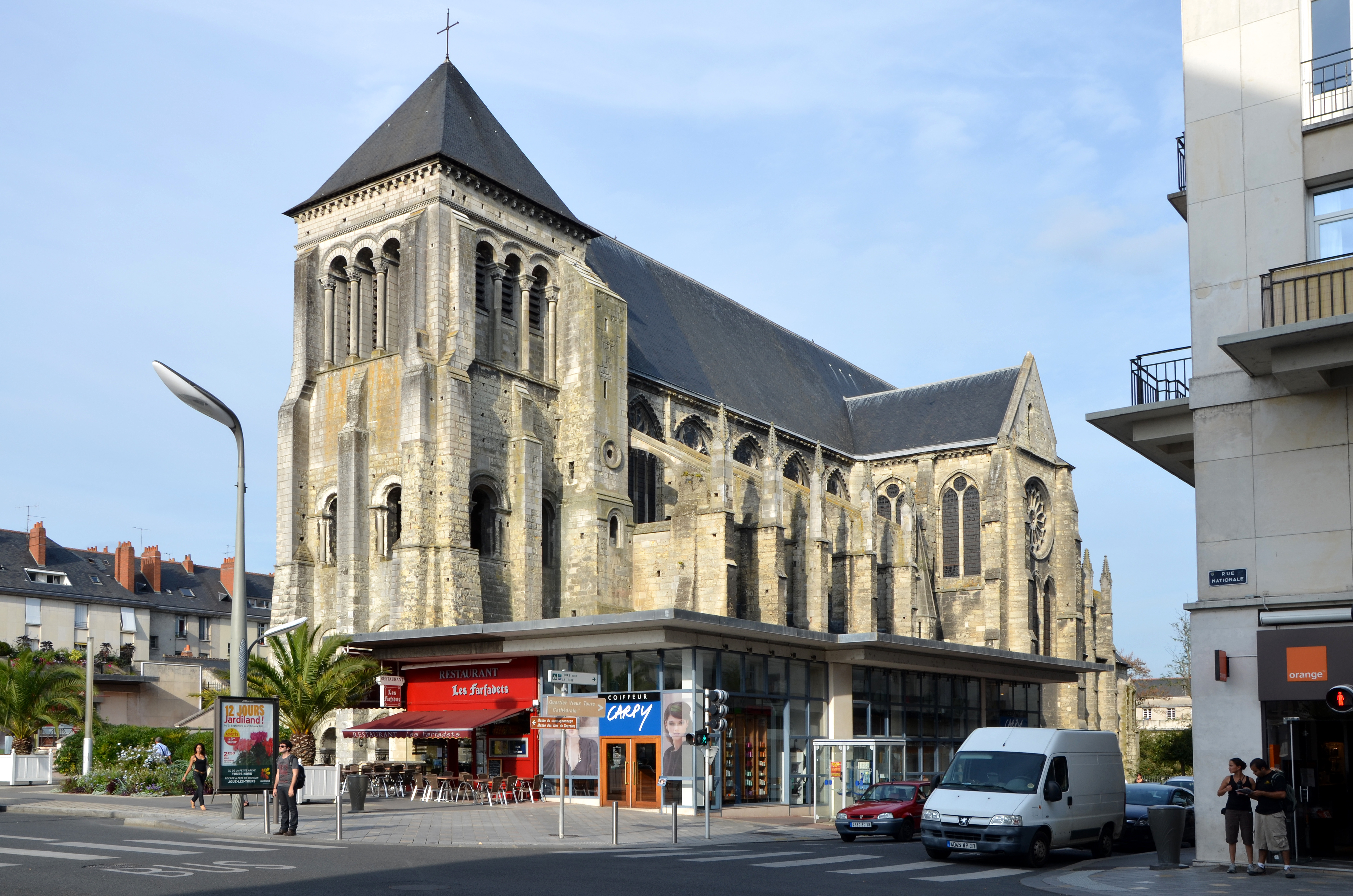 Église Saint-Julien à Tours (Indre-et-Loire, France). Église de l'ancienne abbaye Saint-Julien de Tours de style gothique avec un clocher-porche roman. Construite aux 12ème et 13ème siècles. .